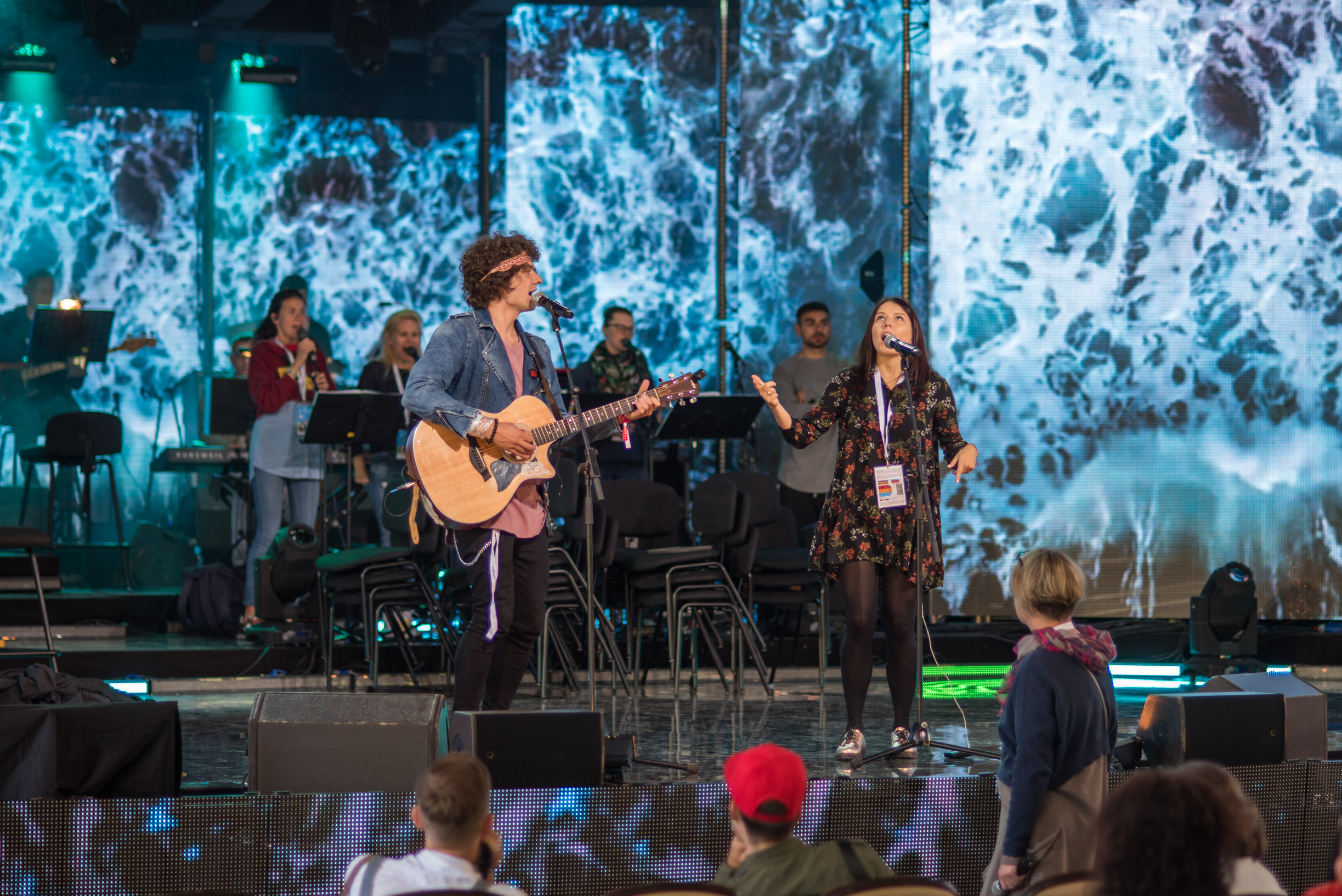 NaviBand на репетиции фестиваля «Лайма. Рандеву. Юрмала 2017»